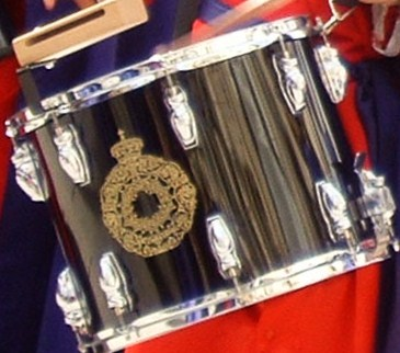 escudo de la coronacion de Espinas en tambor banda